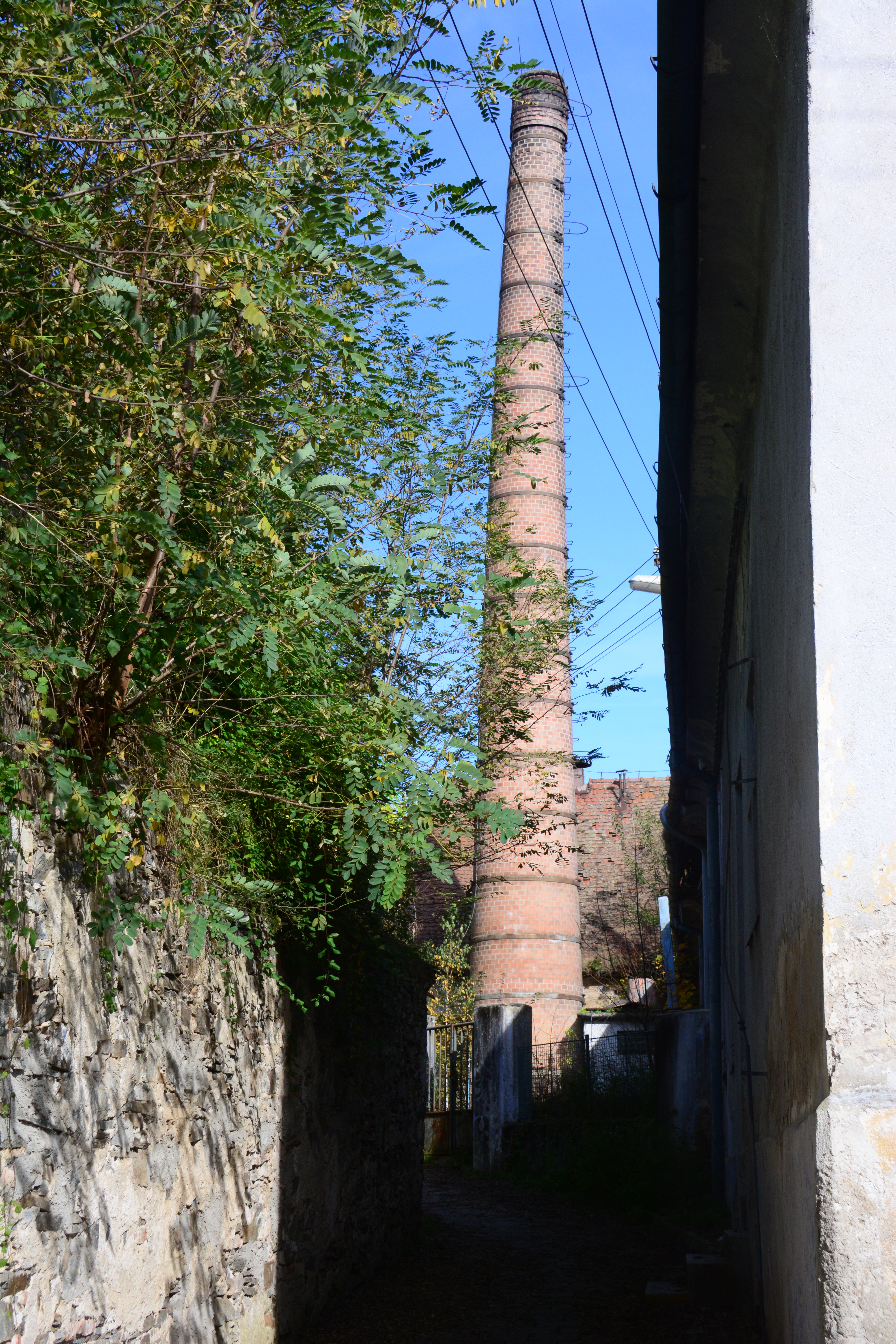 Rauchfang der ehemaligen Geschirrfabrik von Vranov nad Dyjí / Frain an der Thaya